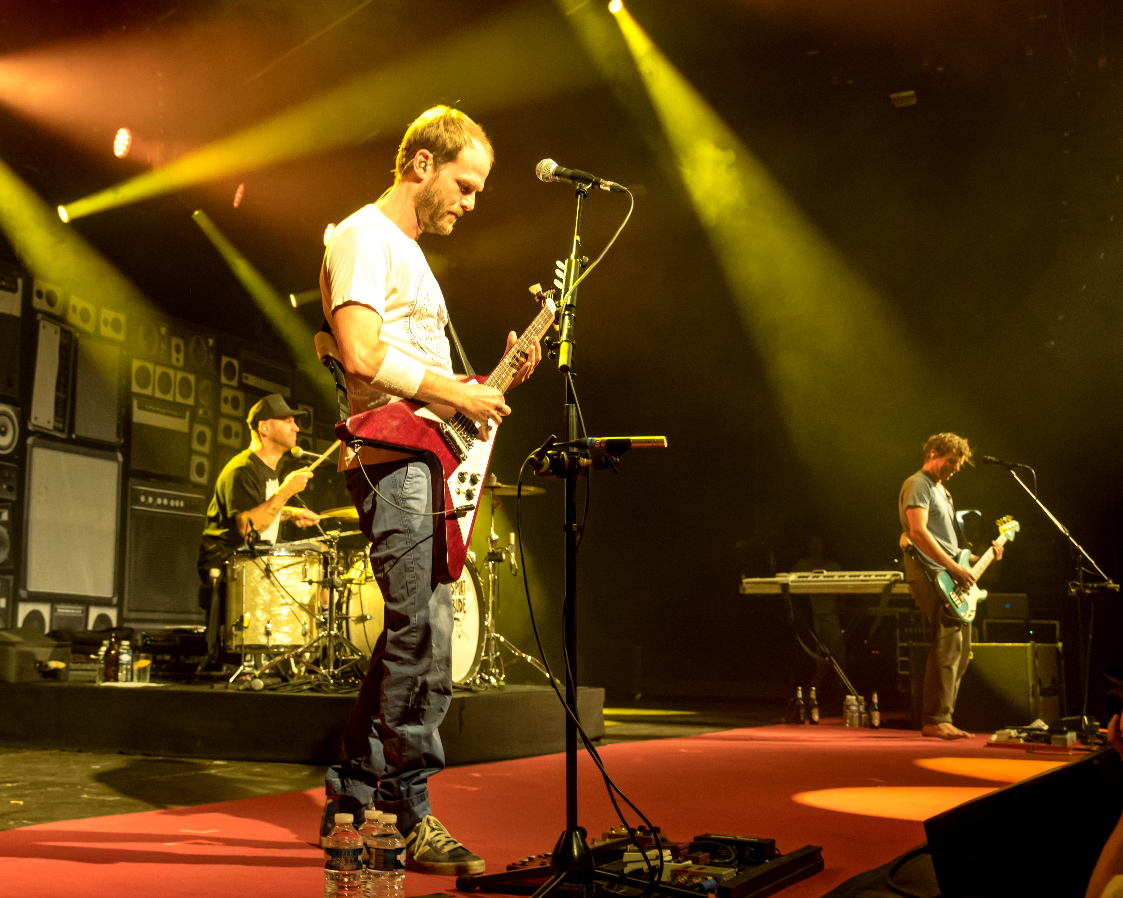 Bilder vom Zelt Musik Festival 2017 in Freiburg im Breisgau Sportfreunde Stiller am 18.07.2017